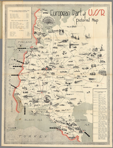 Карта европейской части СССР (также включает в себе Закавказье).